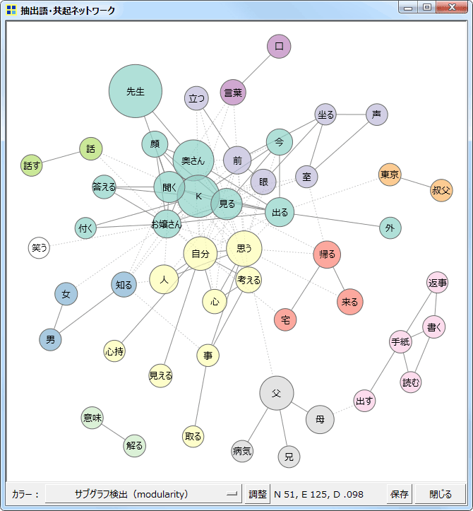 漱石「こころ」を入力データとしてKH Coderで共起ネットワークを作成。